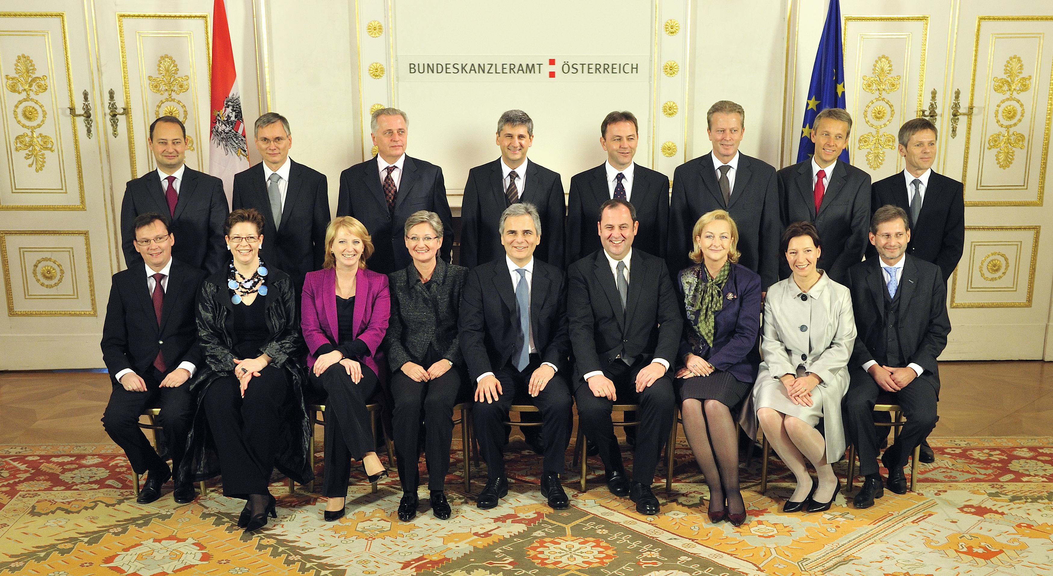 Angelobung der Bundesregierung, 2.12.2008 v.l.n.r. stehend: Andreas Schieder; Alois Stöger; Rudolf Hundstorfer; Michael Spindelegger; Nikolaus Berlakovich; Reinhold Mitterlehner; Reinhold Lopatka; Josef Ostermayer. sitzend: Norbert Darabos; Christine Marek; Doris Bures; Claudia Schmied; Werner Faymann; Josef Pröll; Maria Fekter; Gabriele Heinisch-Hosek; Johannes Hahn (Foto: Zinner)